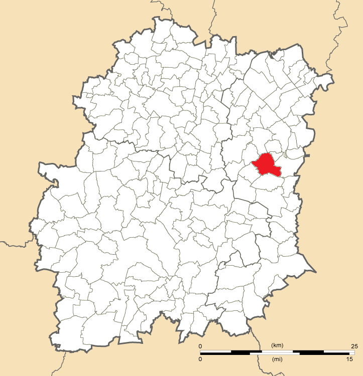 Carte de position de Mennecy en Essonne (91)